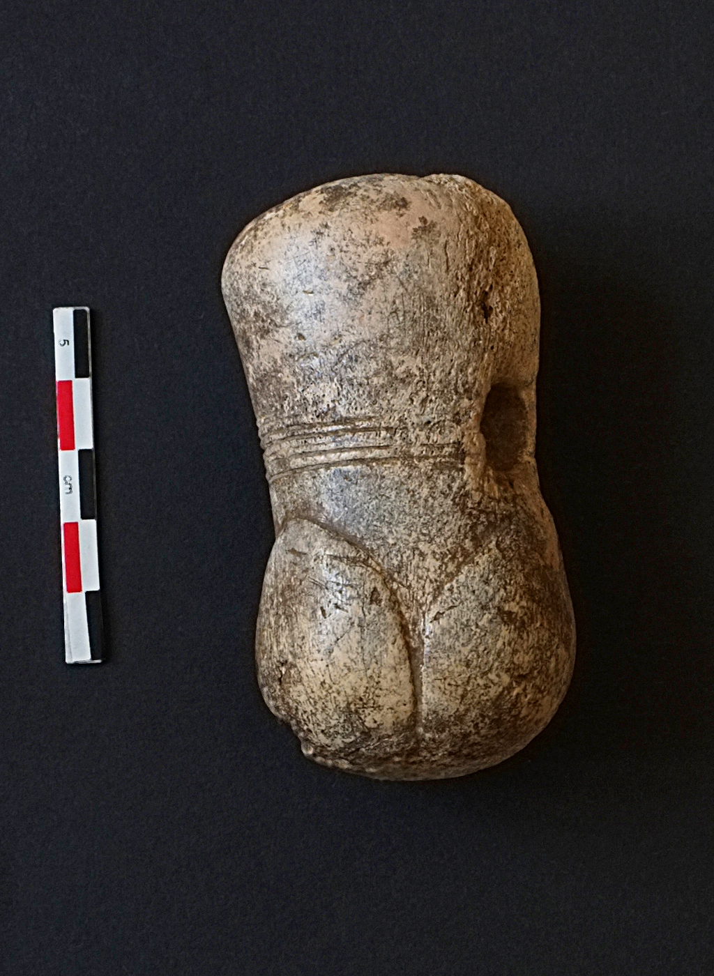 Buynuzdan olan çəkic